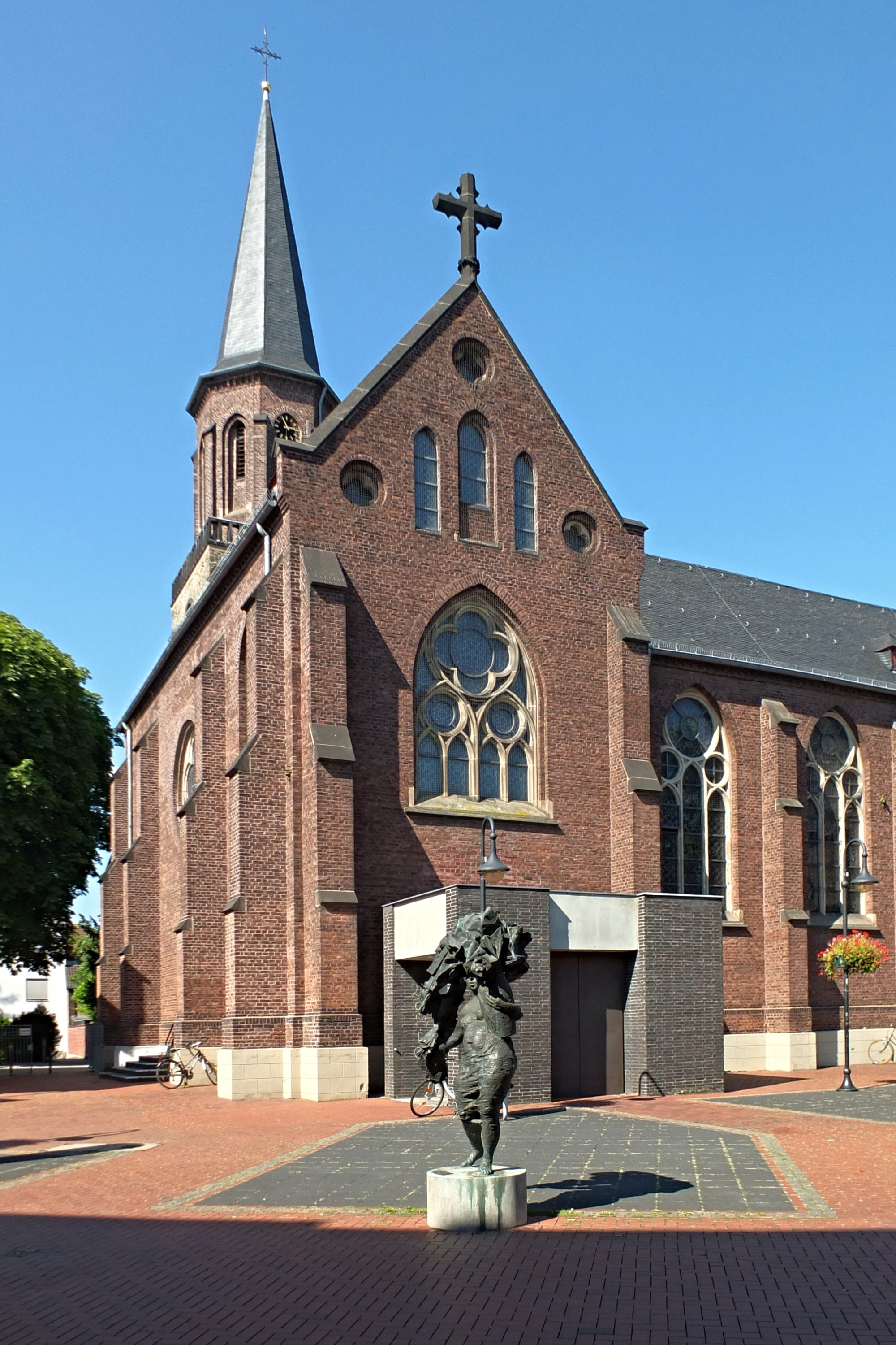 Sankt-Jakobus-Kirche, Hilden, Mittelstraße 10, erbaut 1872-1882 This is a photograph of an architectural monument.